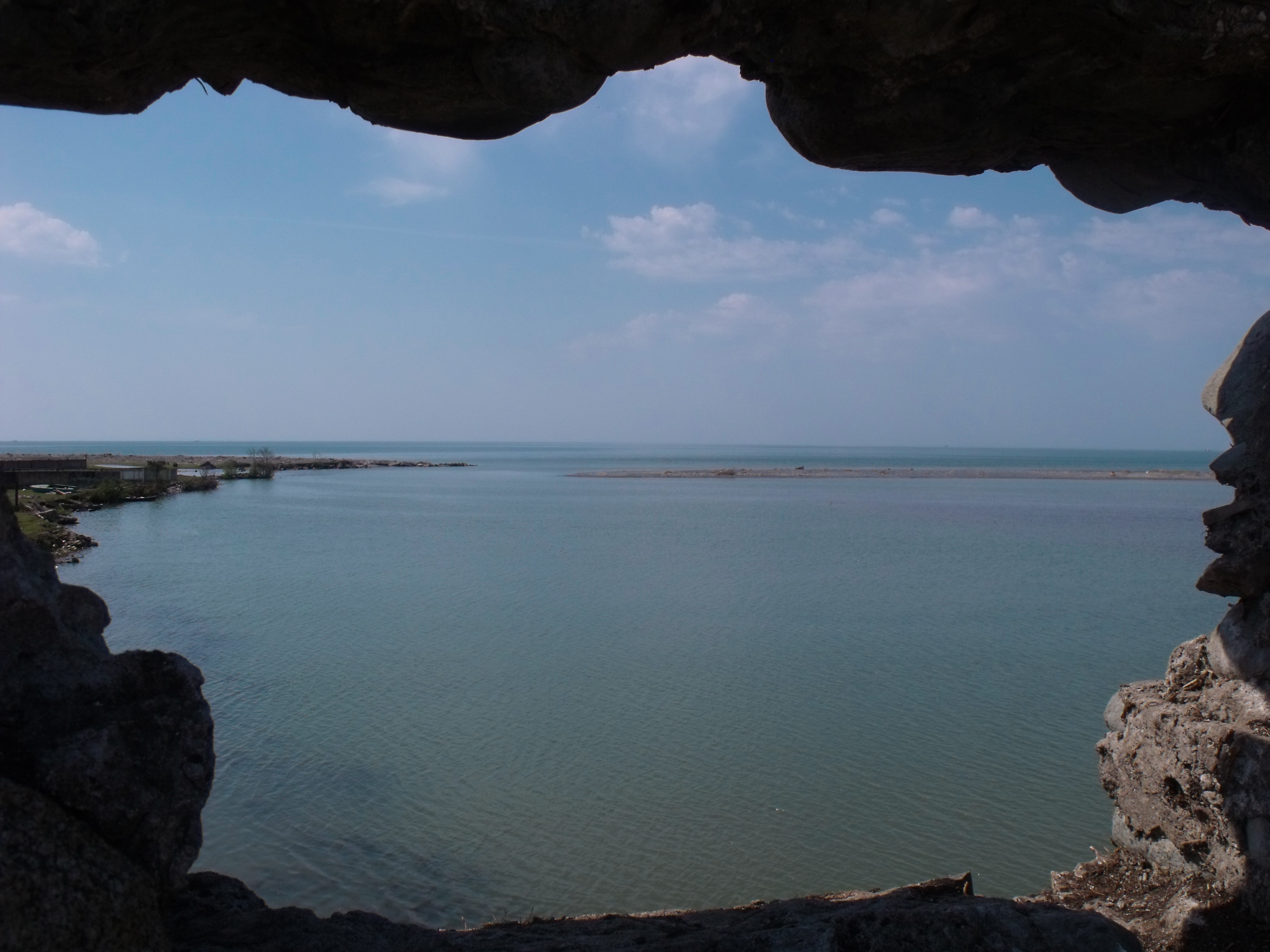 ანაკლია — სოფელი და ზღვისპირა კლიმატური კურორტი ზუგდიდის მუნიციპალიტეტში